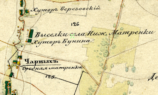 Фрагмент карты с обозначением хутор Бунино. Топографический межевой атлас Тамбовской губернии. Составлен в 1860 году чинами Межевого Корпуса под руководством генерал-лейтенанта Менде. Издан в 1862 году в Москве.